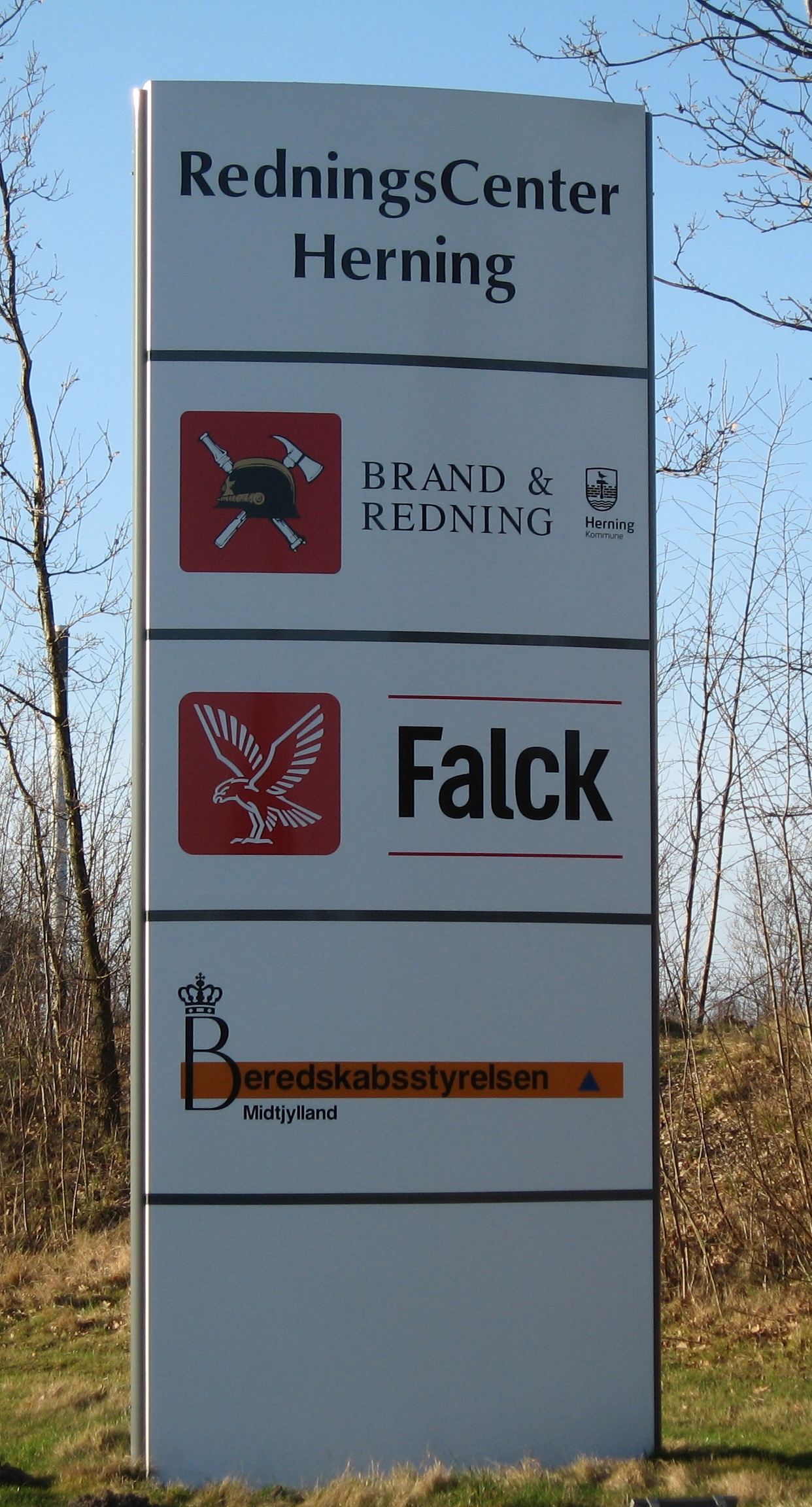 Pylonen til Redningcenter Herning